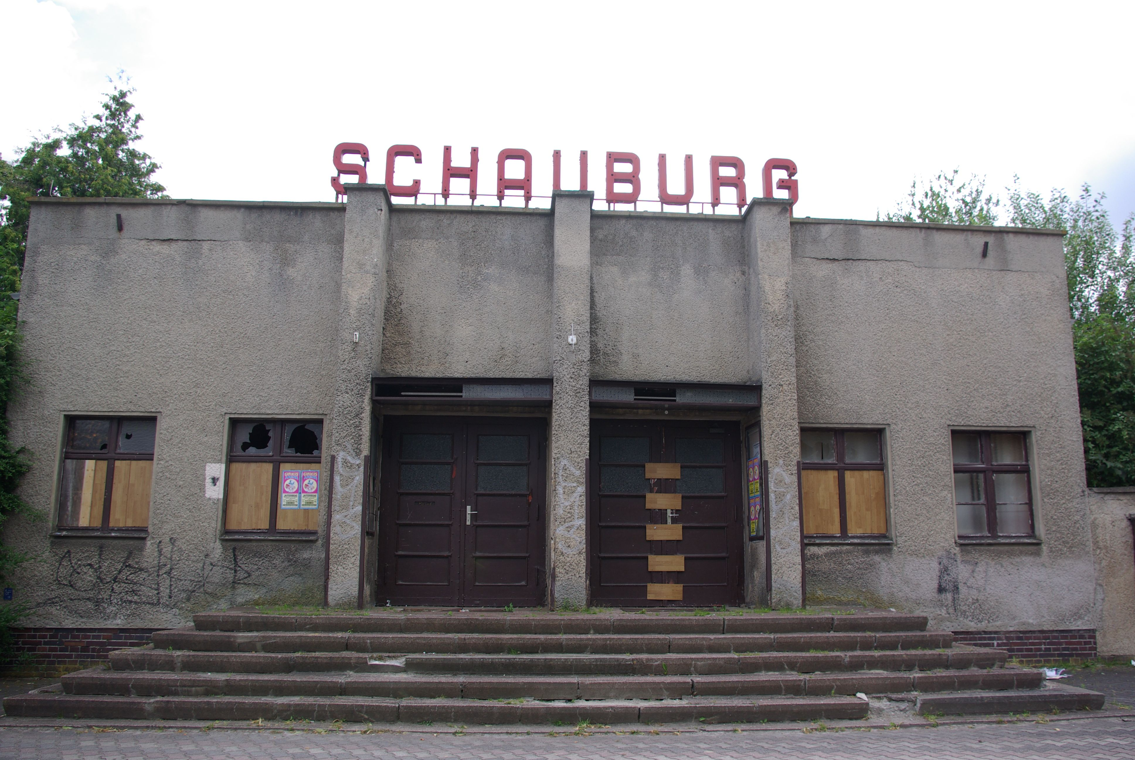 Jüterbog in Brandenburg. Das ehemalige Kino in der Schillerstraße 51. Das Gebäude ist denkmalgeschützt. Das Gebäude zerfällt (12.07.2009).